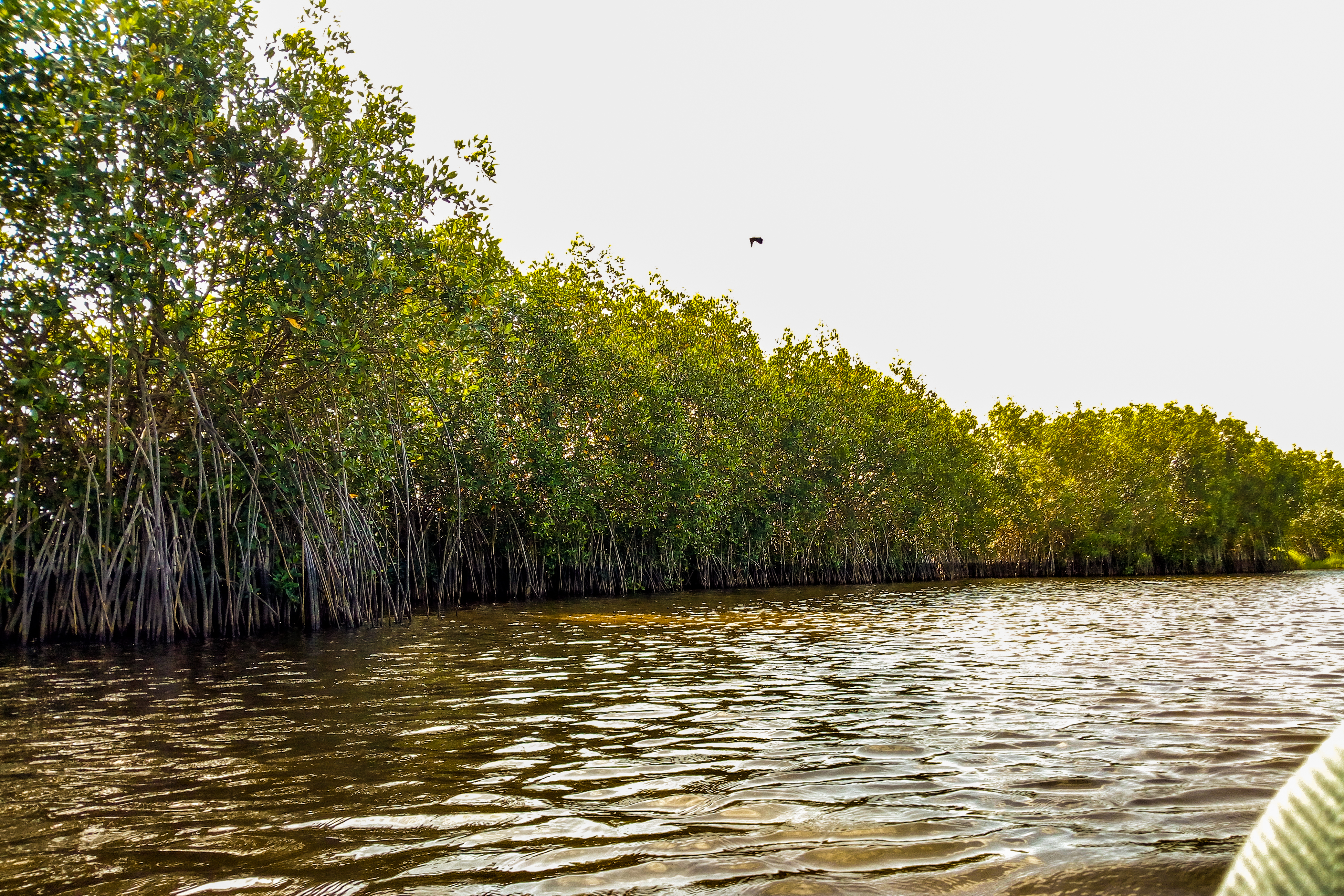 Français cadien: La mangrove de Gbéhoué